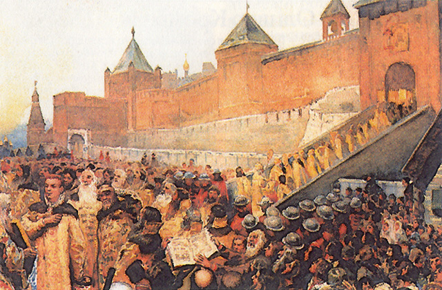 К. В. Лебедев. «Вступление войск Лжедмитрия I в Москву 20 июня 1605 г.». 1890-е гг.